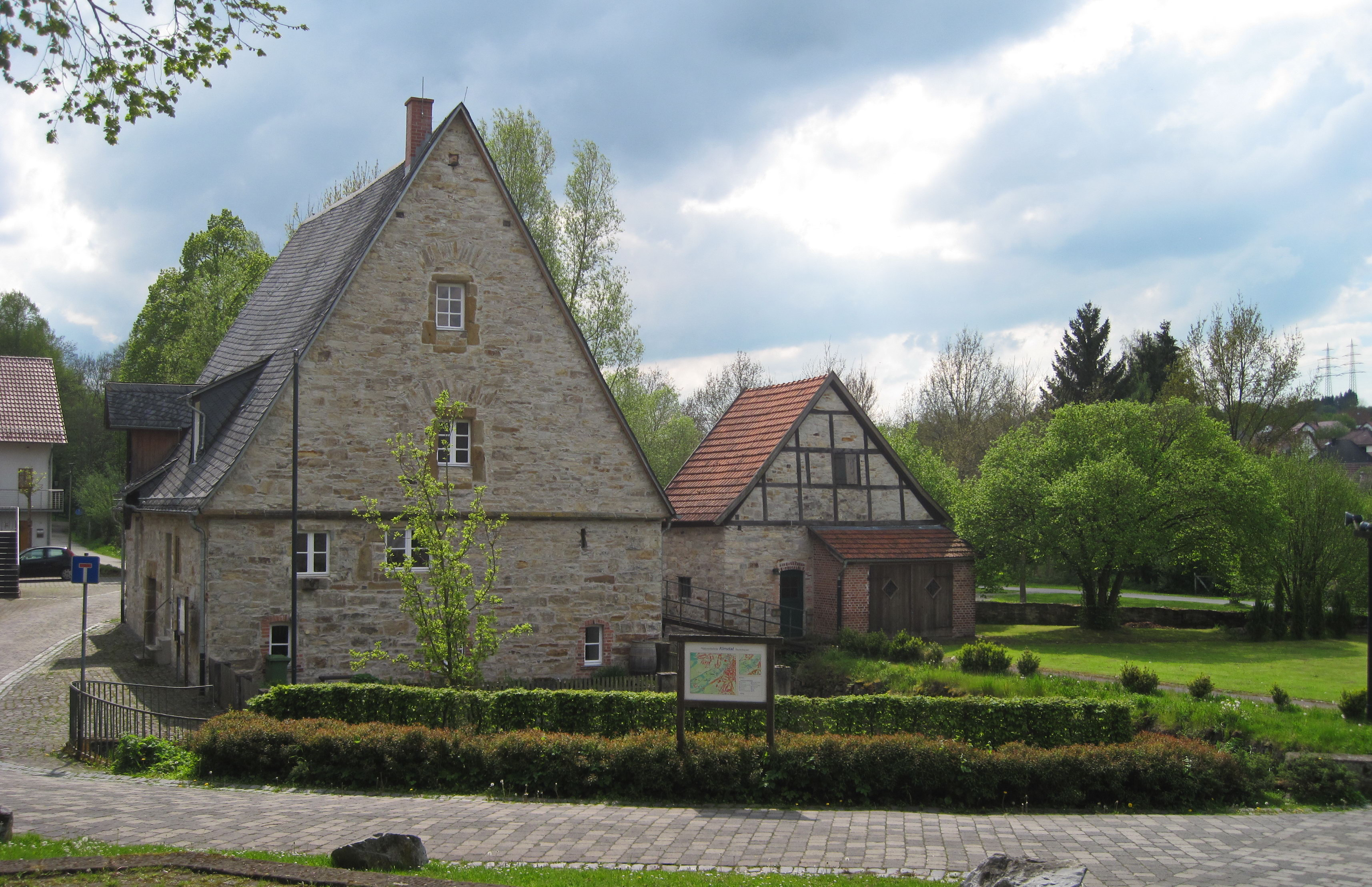 Mittelmühle in Büren (Westfalen), Mühlenstraße 2 This image shows a heritage building in Germany, located in the North Rhine-Westphalian city Büren (Westfalen) (no. 4/30).